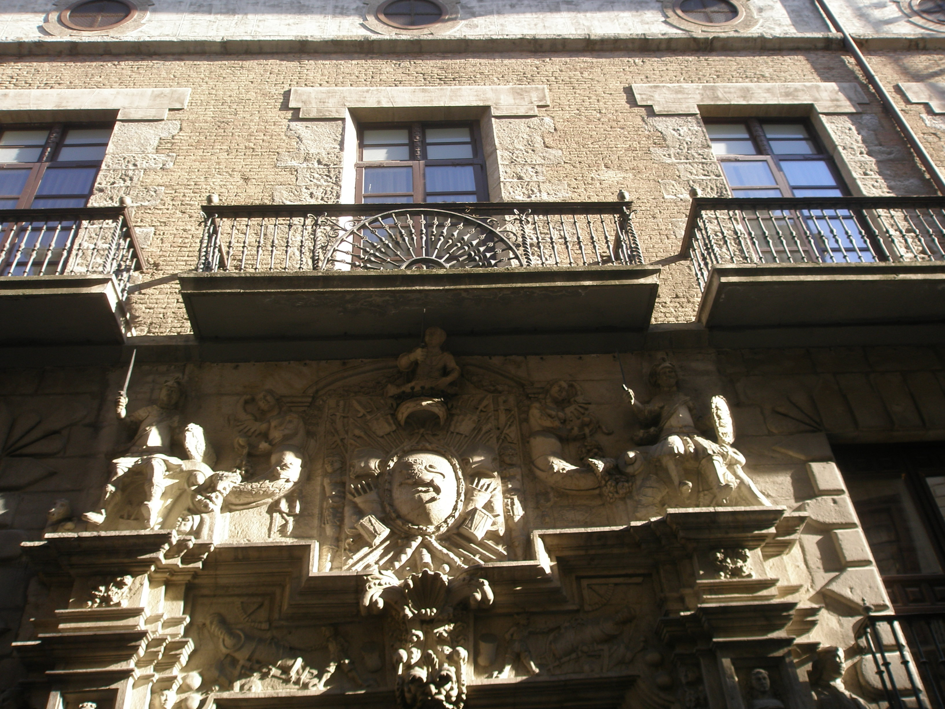 Fachada barroca del Palacio de Ezpeleta en Pamplona